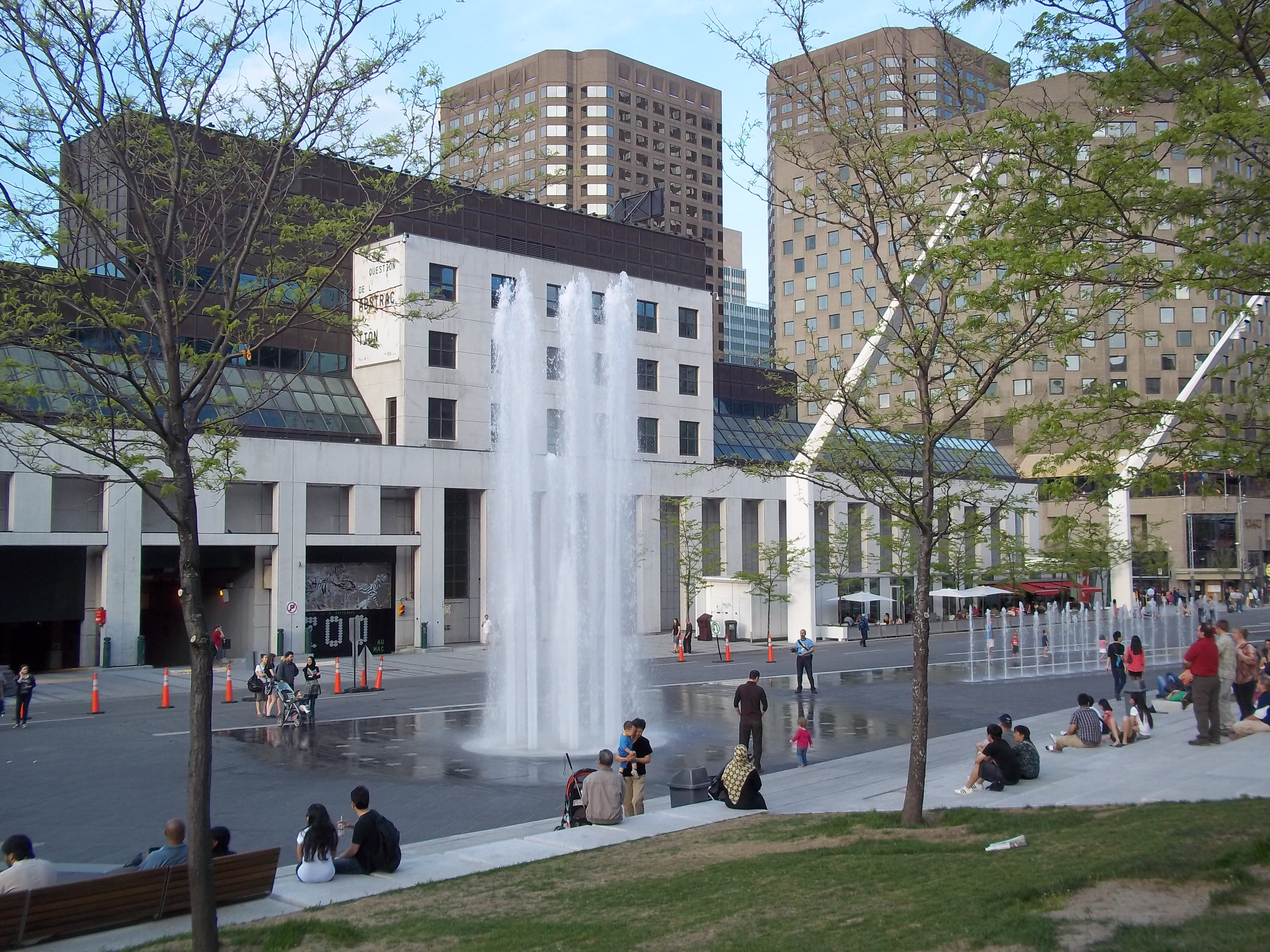 Jets d'eau de la Place des Festivals à Montréal